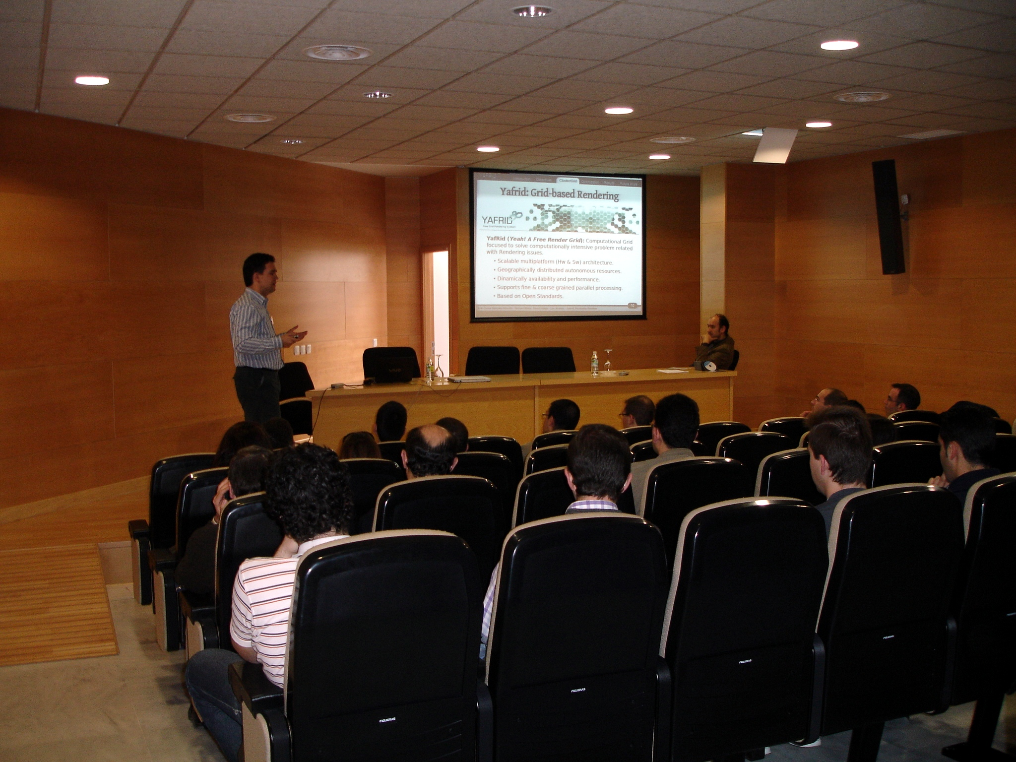 Yafrid, FLOSS International Conference